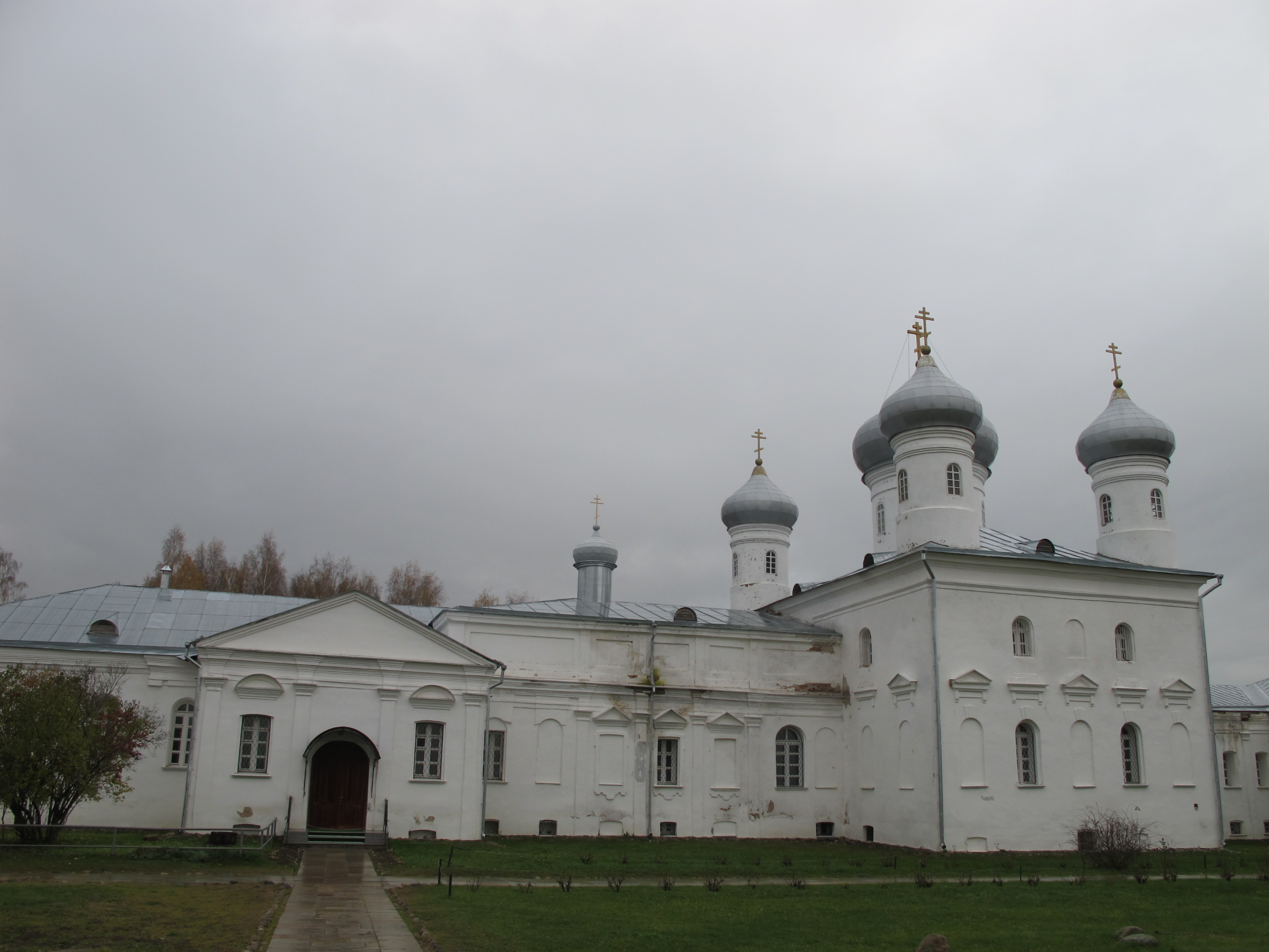 Юрьев монастырь (Великий Новгород)